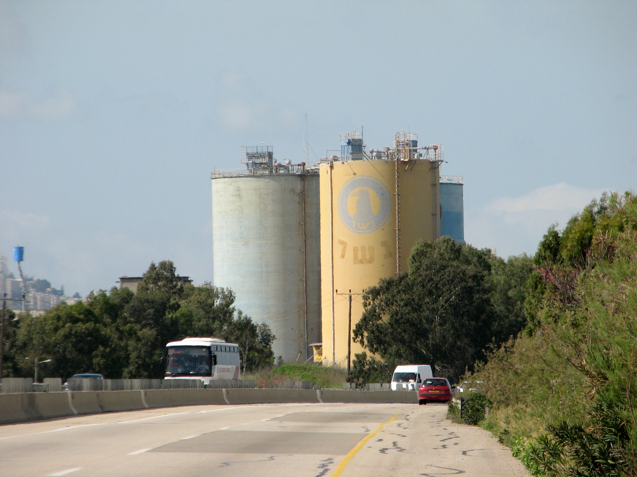 The City Nesher on Mount Carmel and Suburb:Central Nesher & Tel Hanan תמונות משכונותיה של העיר נשר, מרכז נשר האזור ליד בית החרושת נשר ותל חנן, בית החרושת נשר למלט. מבנה ה"סילו, שמשמים לאחסון. המבנים נראים למרחוק לכל הנוסע בכביש 75 מהעמקים לחיפה